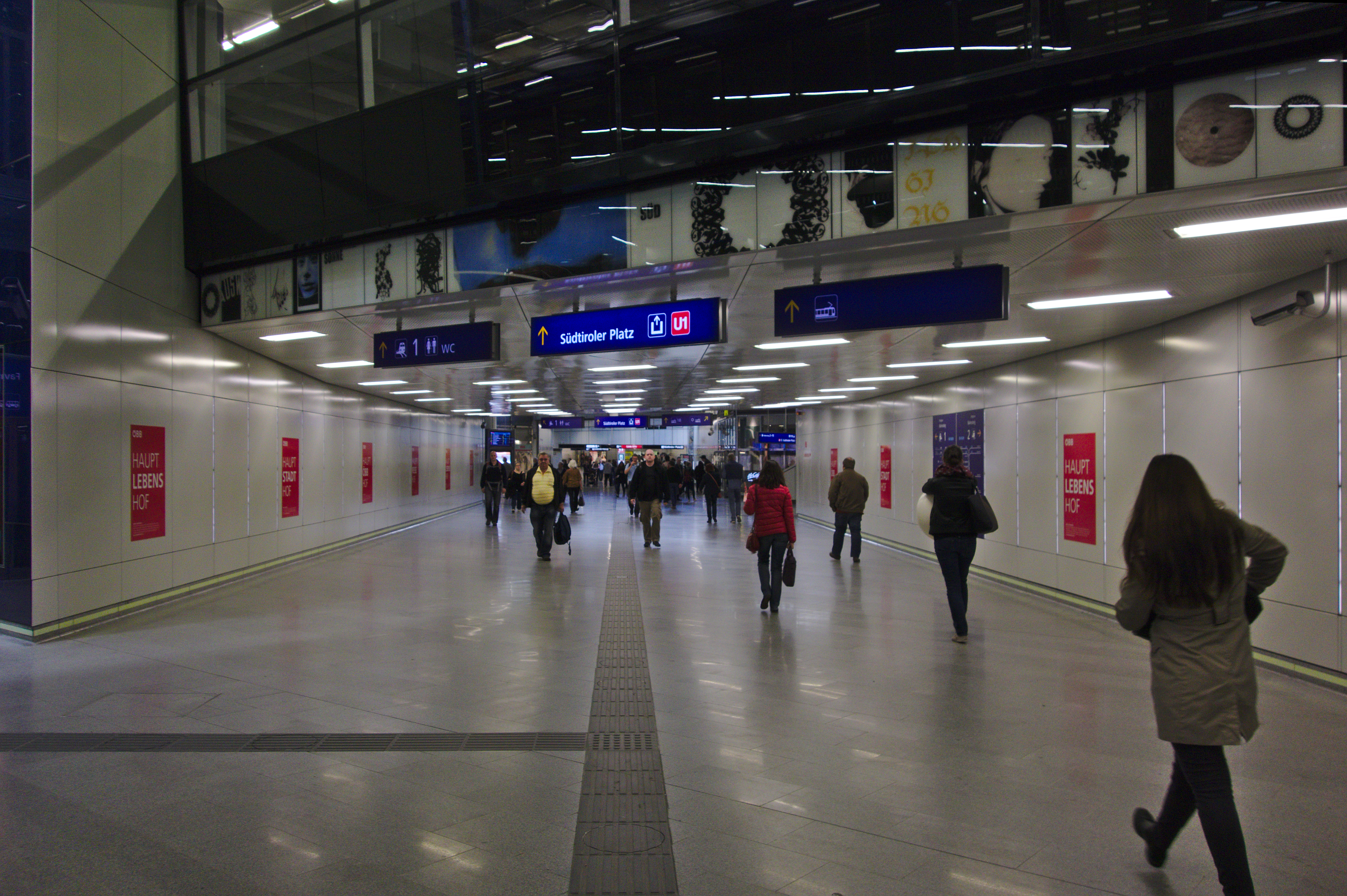 Wien Hauptbahnhof